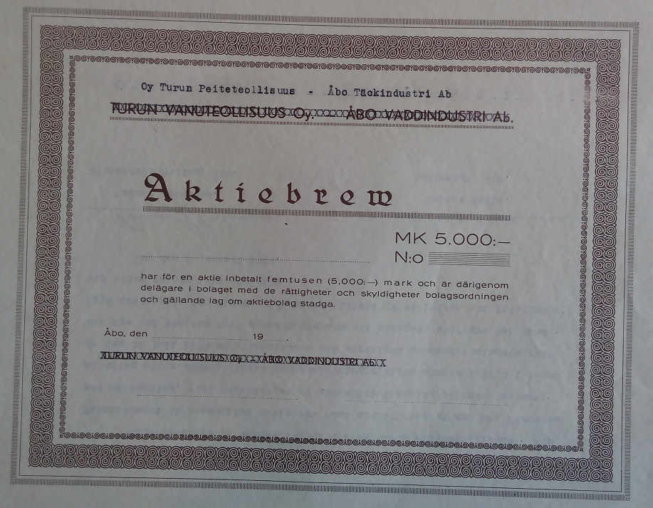 Turun Peiteteollisus osakekirja